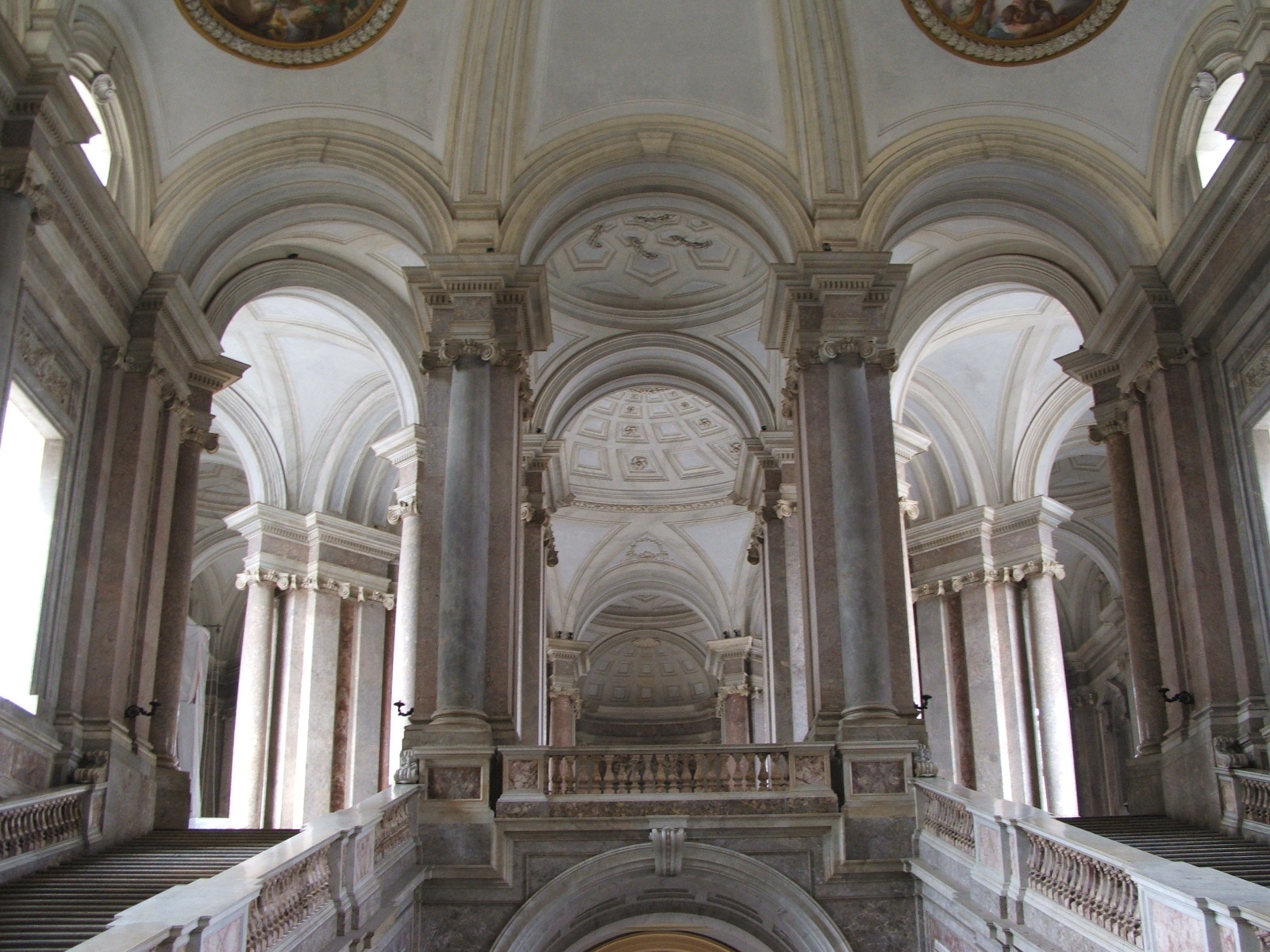 Caserta, Reggia di Caserta - Scalone Reale